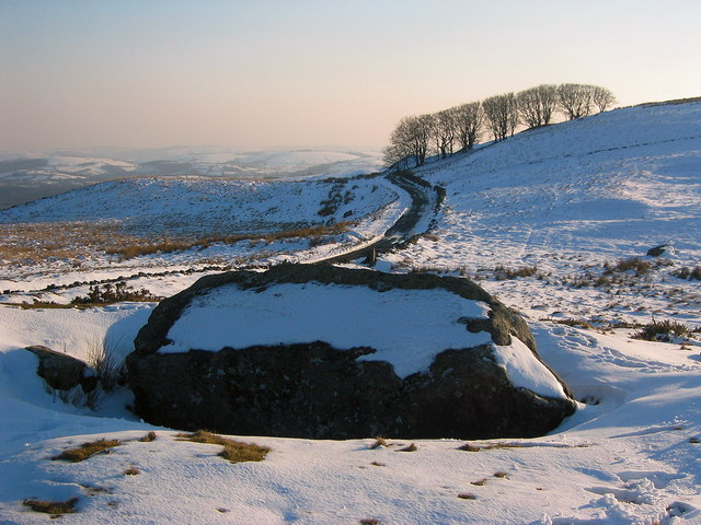 Carreg y Bwci Dywedir bod ceffylau ofn mynd heibio'r garreg, oherwydd melltith y Bwci. Mae'r coed ffawydd yn un o hynodion tir uchel Shir Gâr. It is said that horses fear this stone, because of an ancient spell cast by a Bogeyman ('Bwci' in Welsh). The beech trees are a notable feature on the Carmarthenshire skyline.